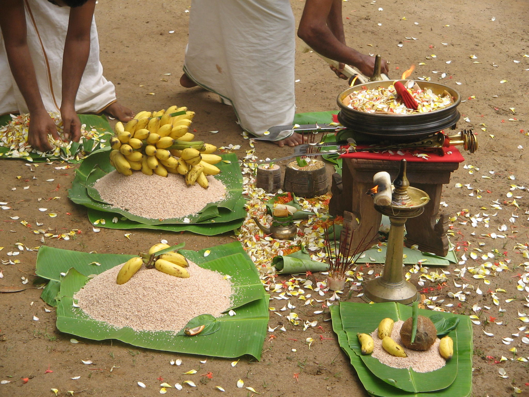 ഒരുക്കങ്ങൾ. സ്ഥലം: വെള്ളക്കട്ട്മന